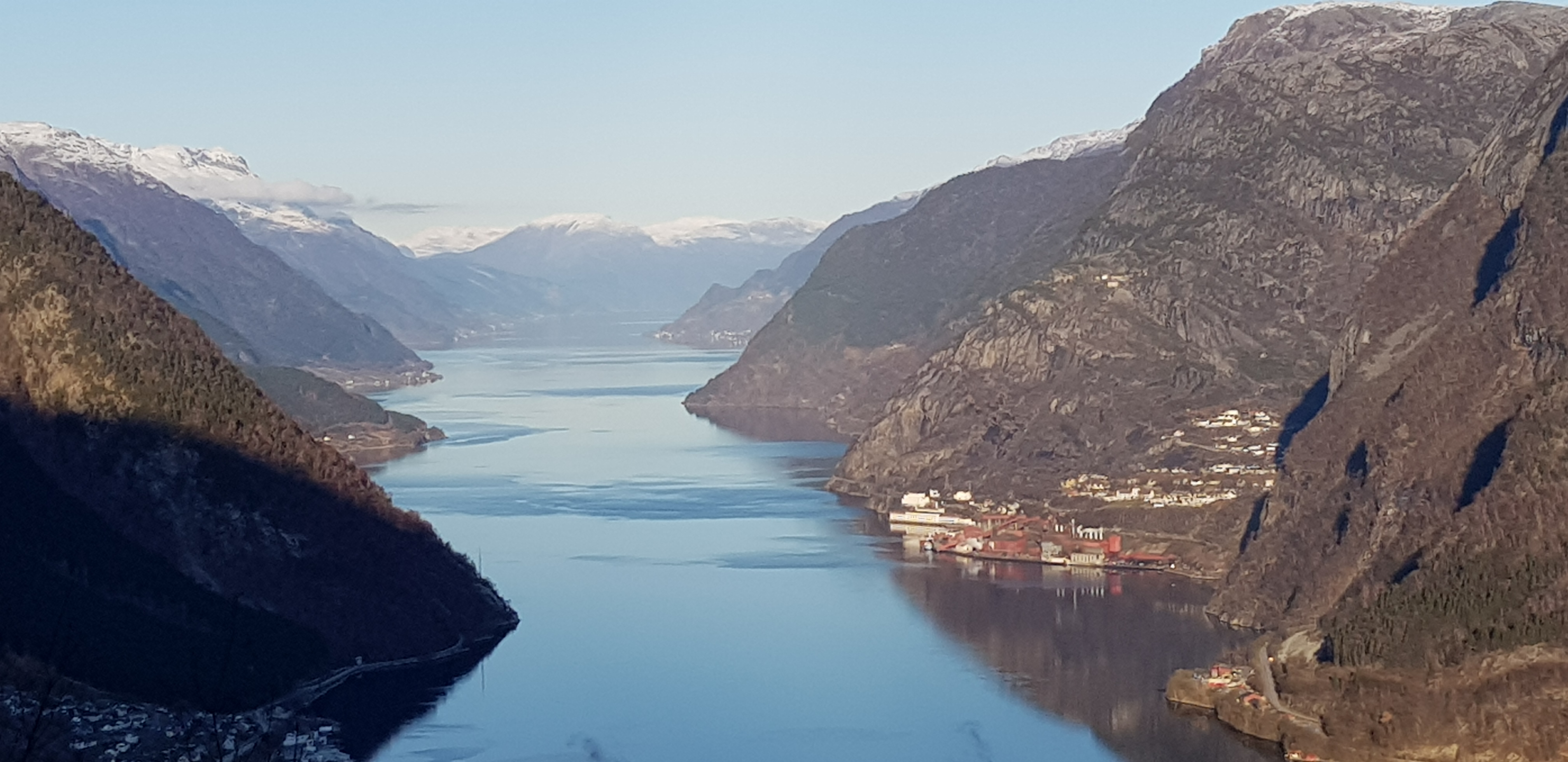 Oversiktbilde av Tyssedal tatt fra sør.